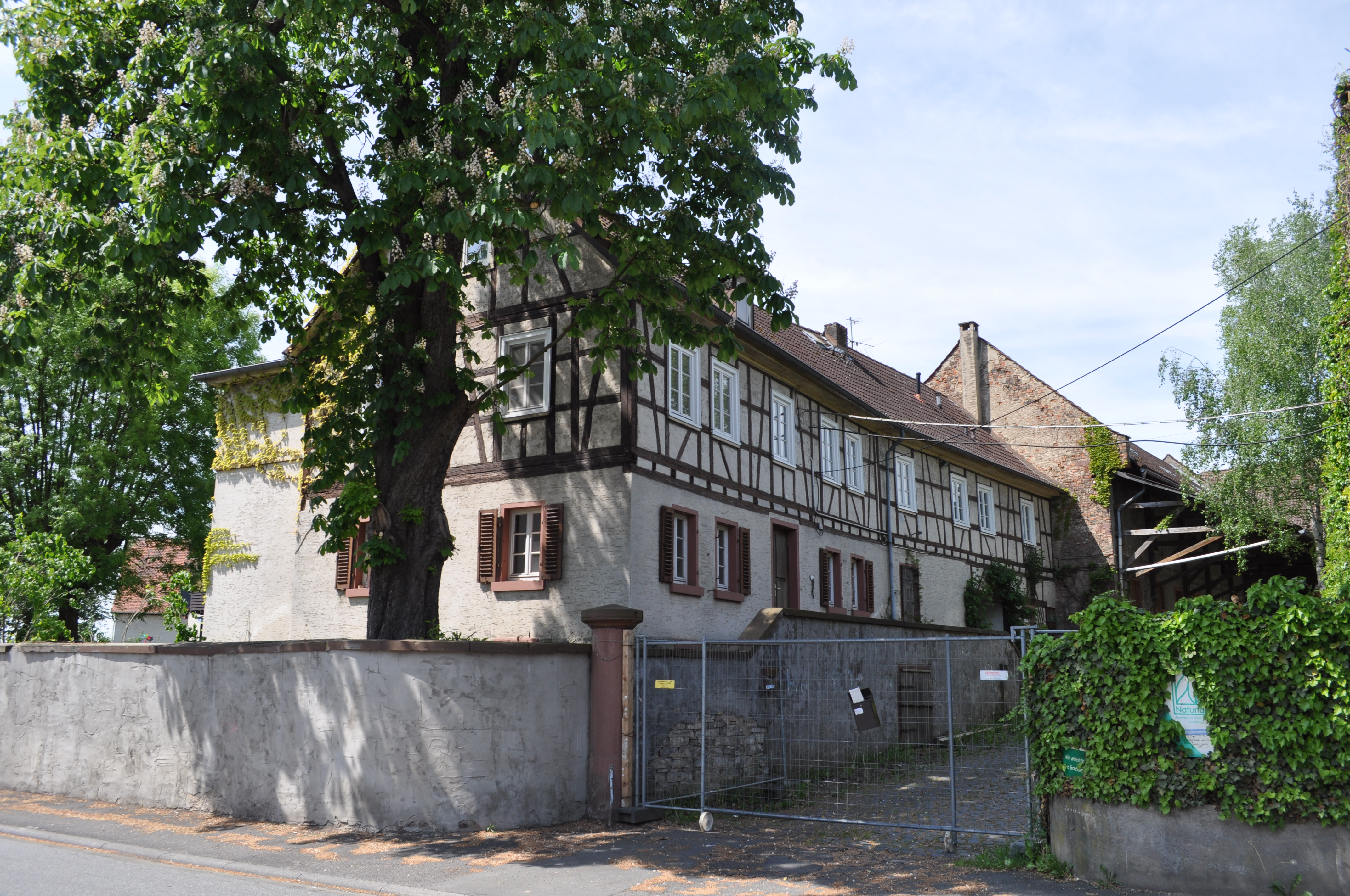 Ober-Erlenbach, Staatsdomäne Oberhof, Haupthaus